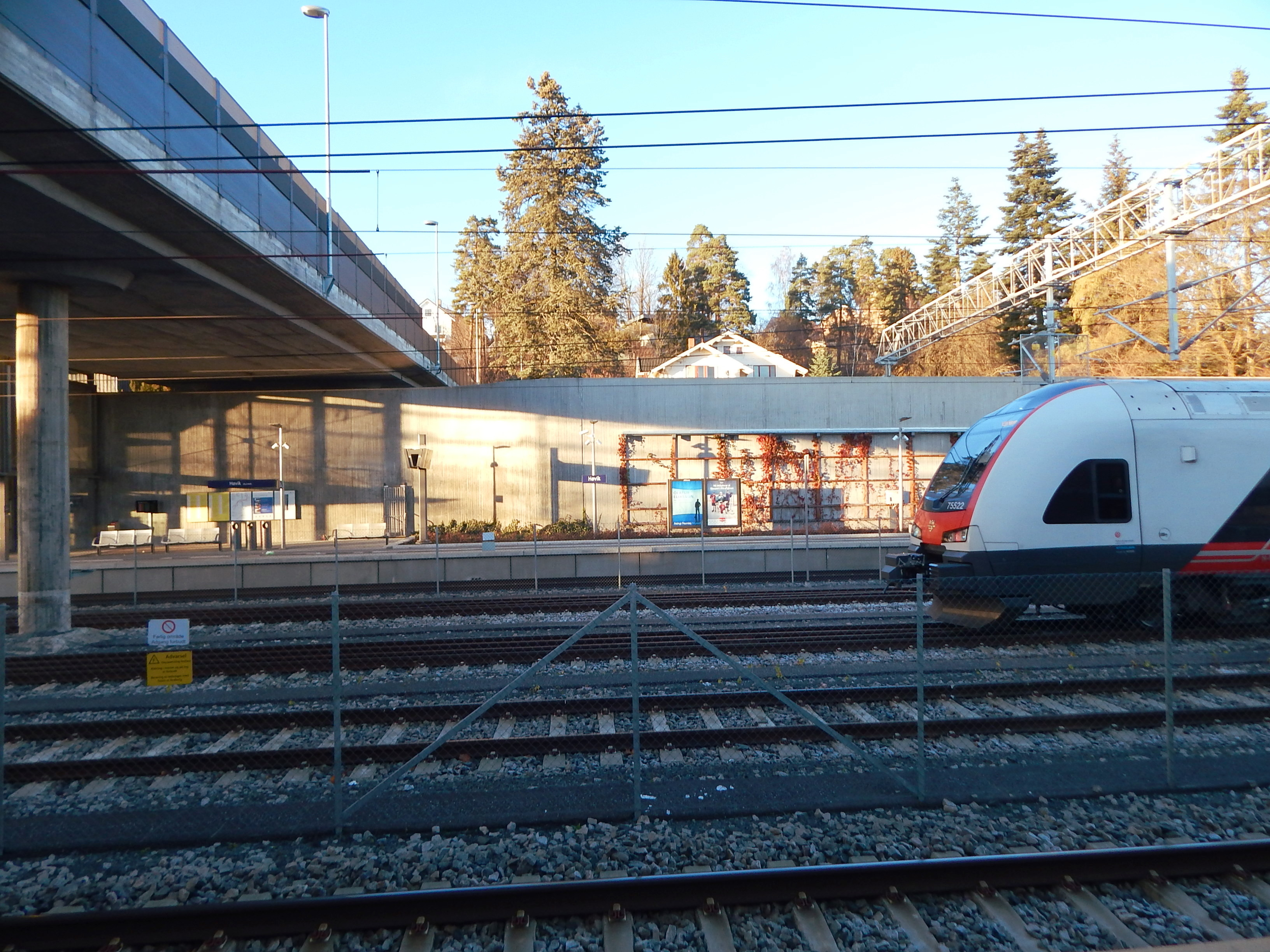 Høvik stasjon anno 2017